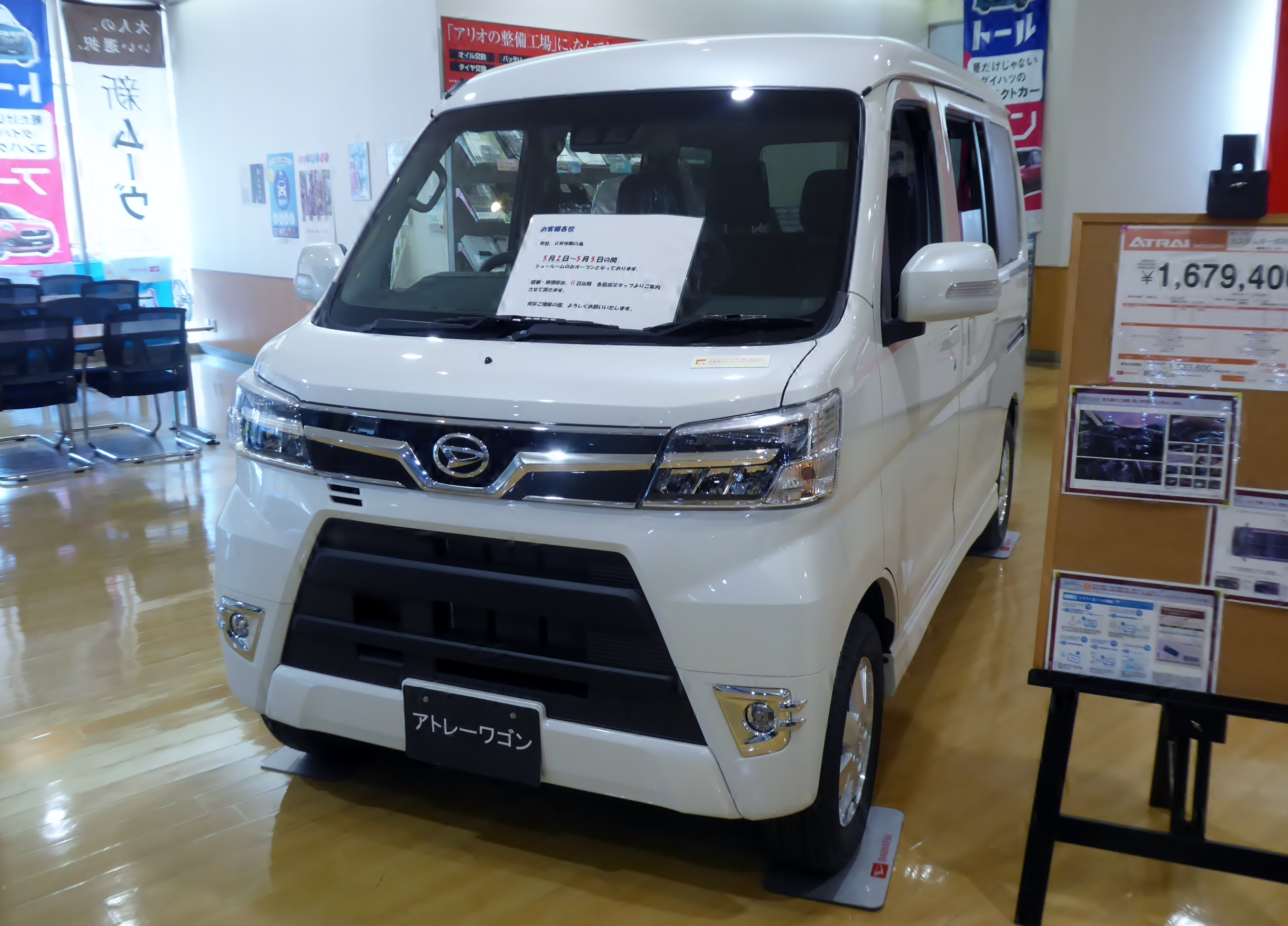 ABA-S321G-ZQXZ型ダイハツ・アトレーワゴンカスタムターボRS"リミテッドSA III"をフロントから撮影。